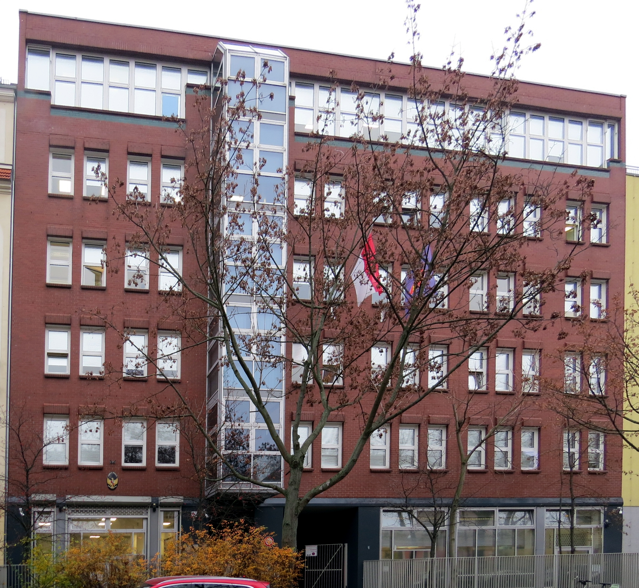 Botschaftsgebäude in Berlin-Mitte, Indonesien